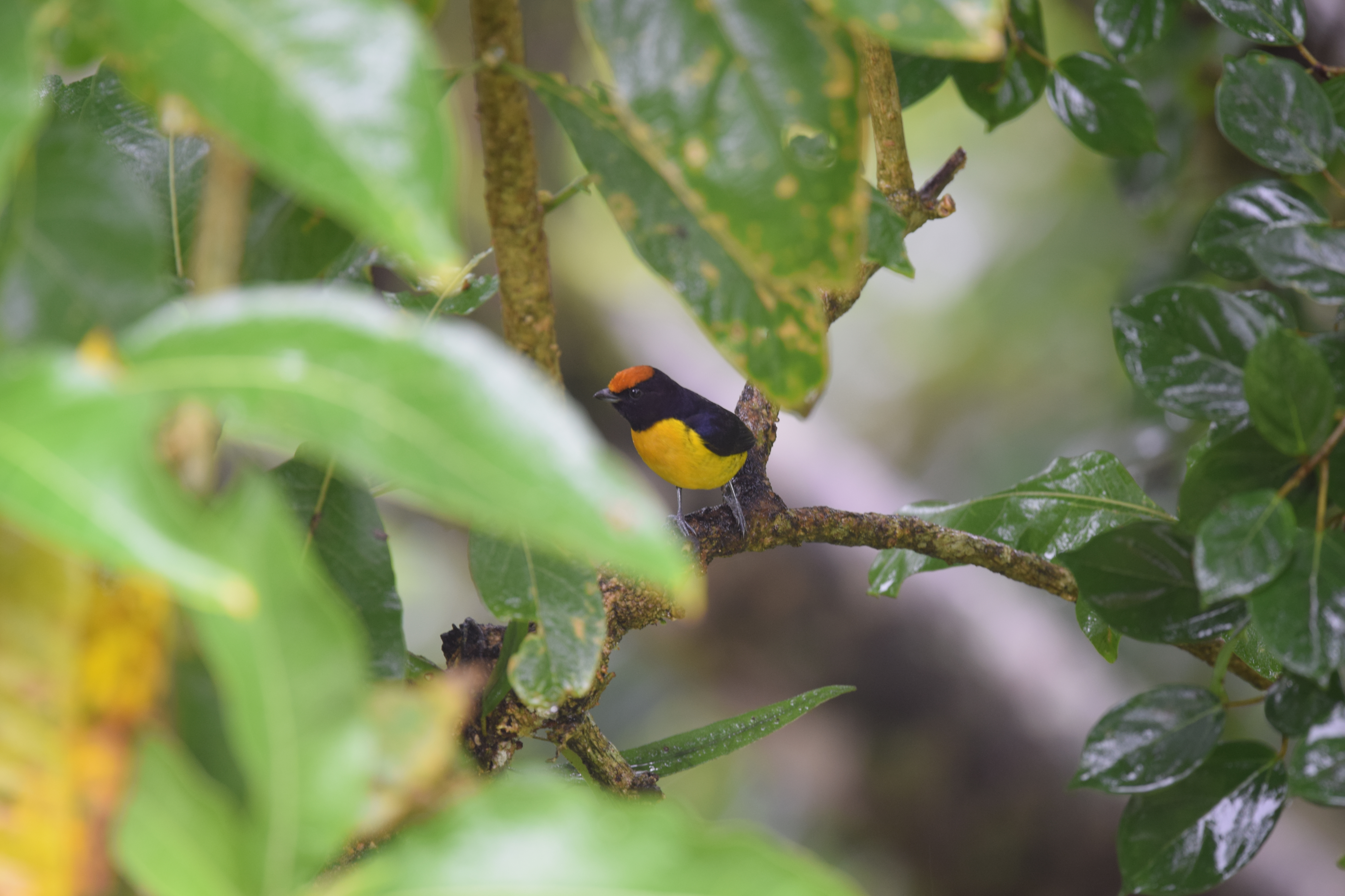 Costa Rica - 2/11/16 Rancho, CATIE, Casa Turire and Laguna Angostura